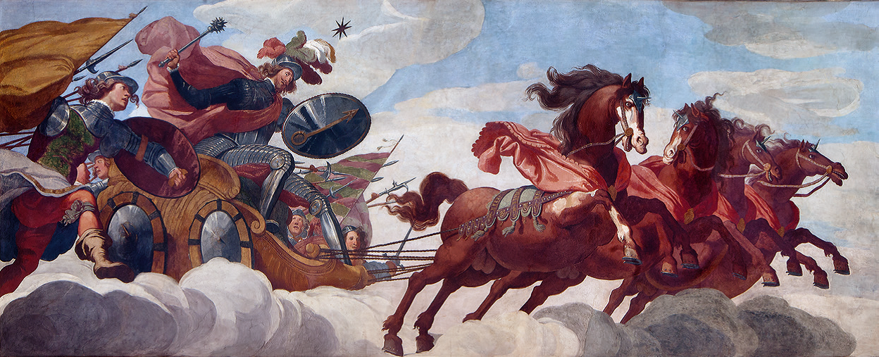 Il Carro di Marte. Il grande affresco è generalmente interpretato come un ritratto allegorico del generale Albrecht von Wallenstein, committente dell'opera e per molti anni "uomo forte" dello schieramento cattolico-imperiale nel corso della Guerra dei Trent'anni